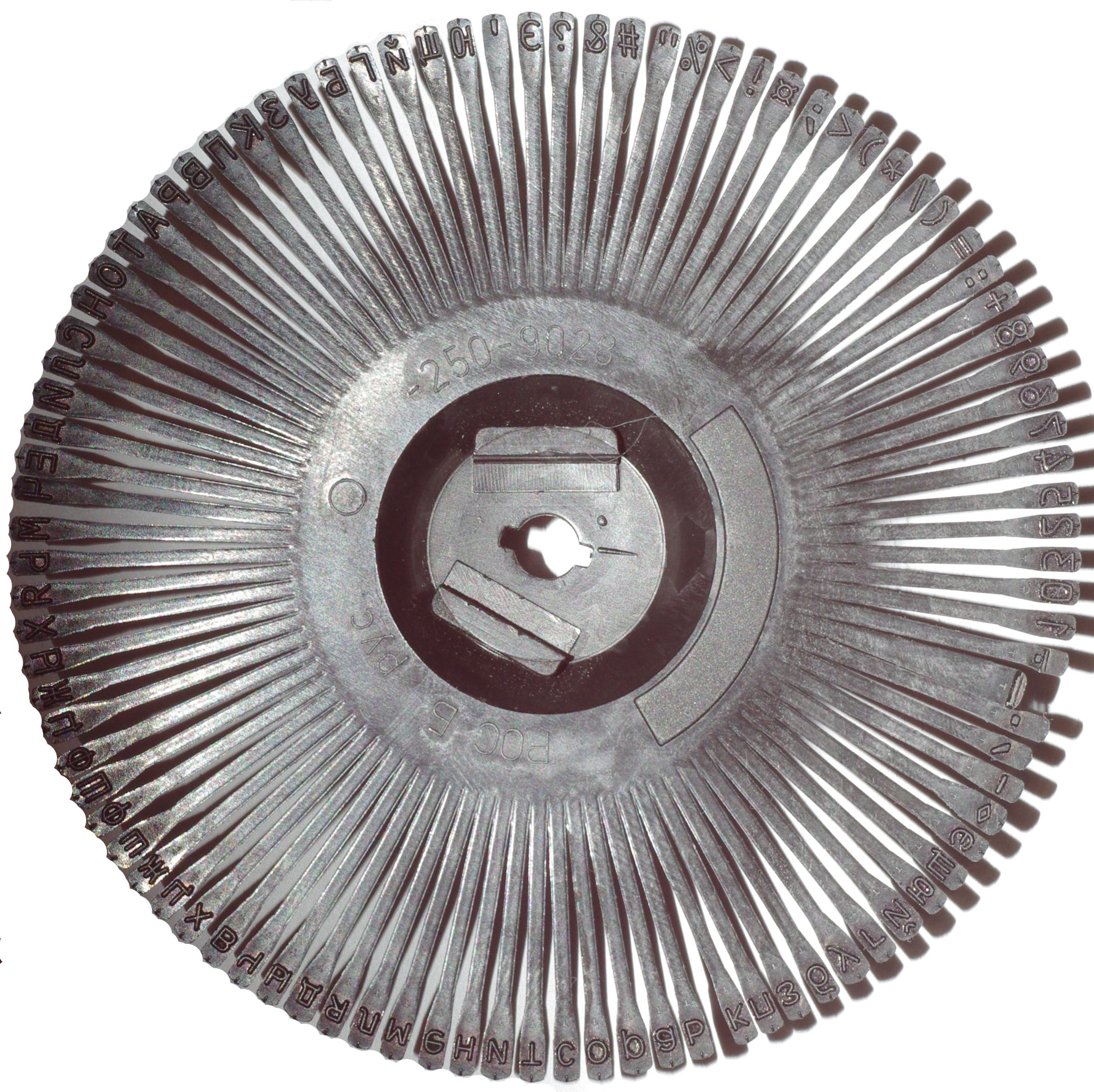 Лепестковое печатающее устройство "ромашка" с кириллическим набором знаков